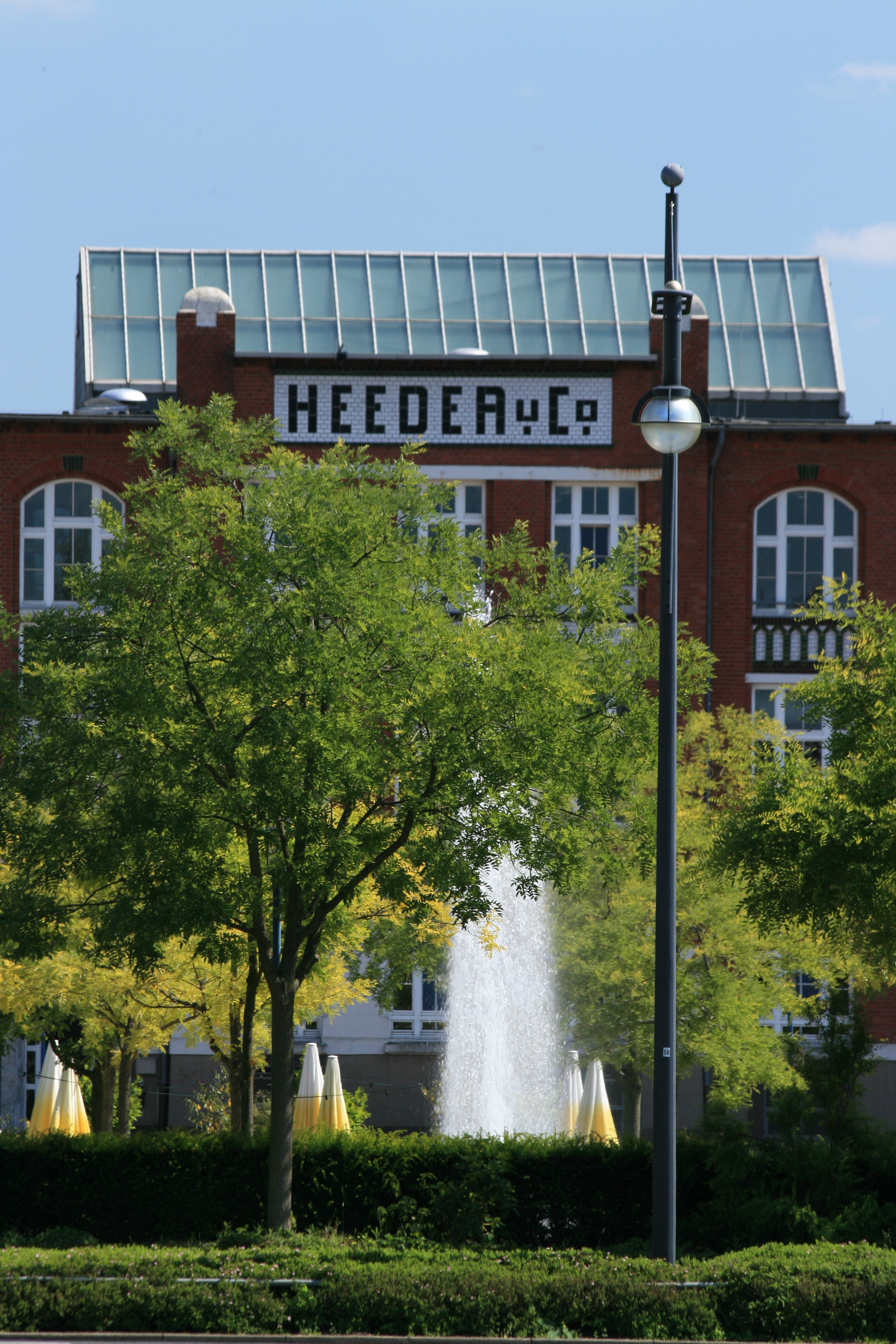 Krefeld, Kinder- und Jugendtheaterzentrum der Stadt in der Fabrik Heeder, Virchowstraße 130, Denkmal Nr. 365 This image shows a heritage building in Germany, located in the North Rhine-Westphalian city Krefeld (no. 365).